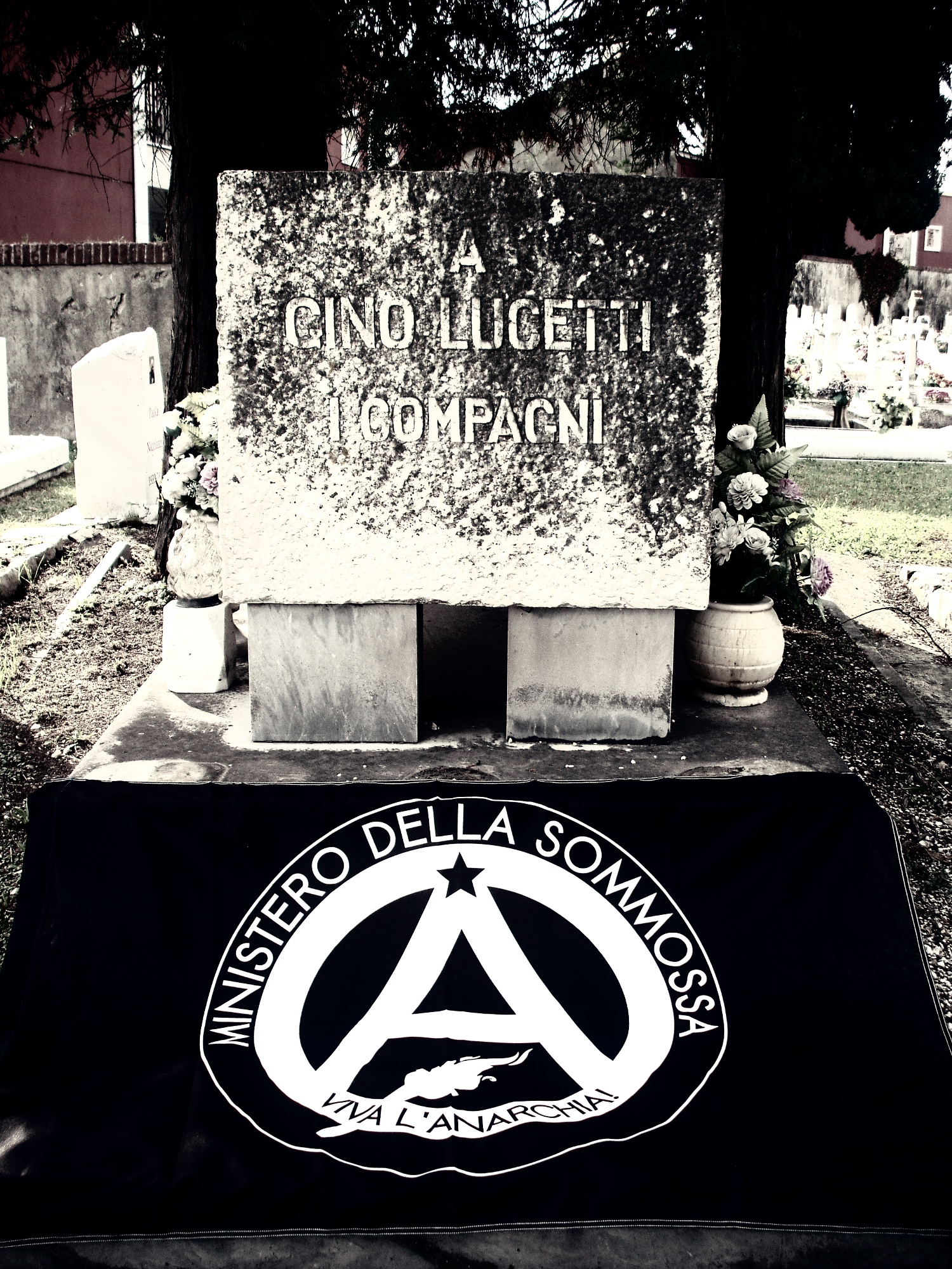 Tomba di Gino Lucetti, Cimitero di Turigliano, Carrara.